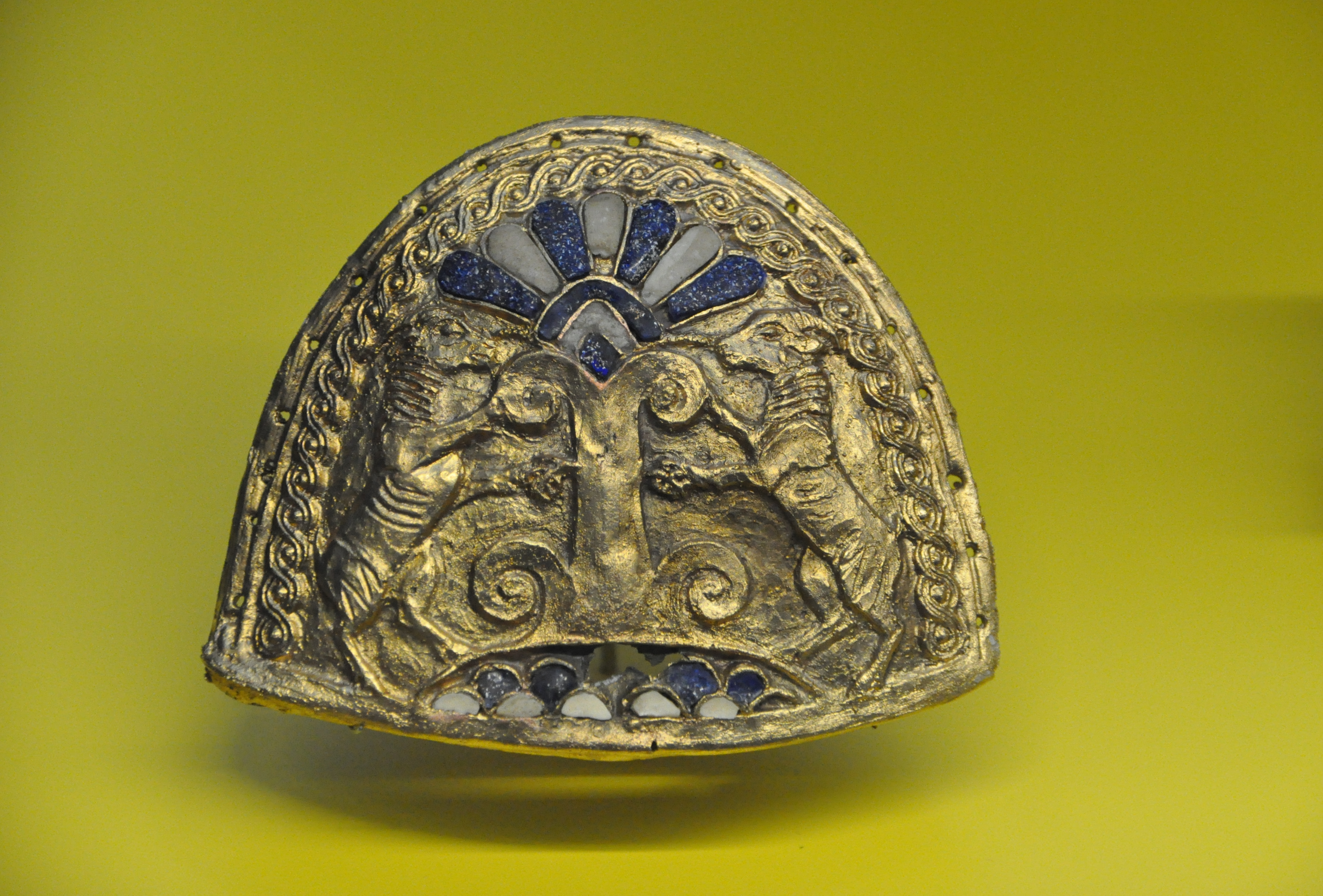 Zierbesatz für Kleidung (Museumsreplik), gefunden in einem Grab bei Tell Halaf.